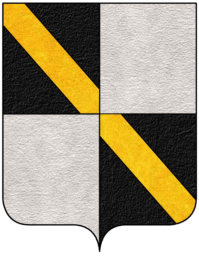 Stemma della famiglia Lando